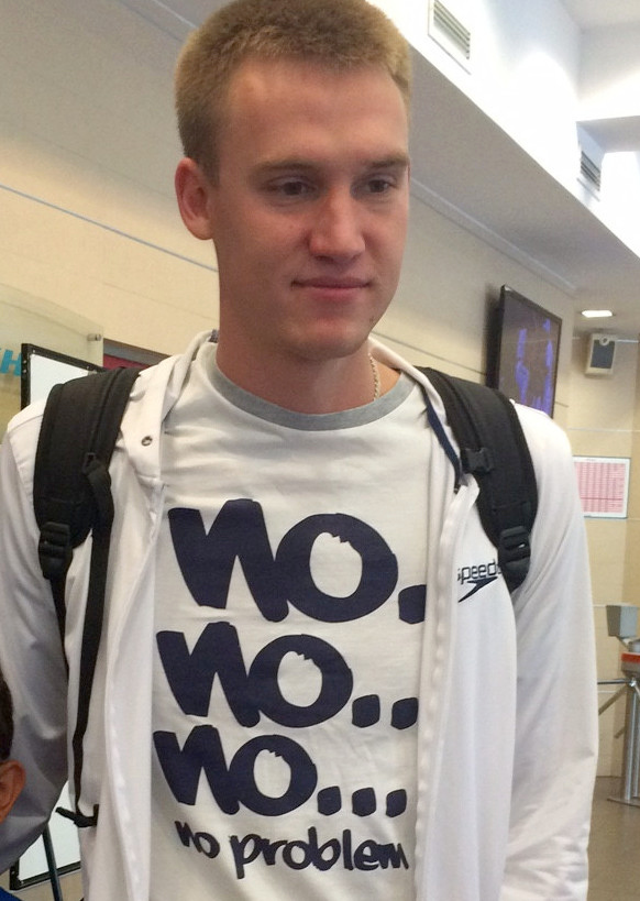 Олимпийский чемпион Рио-2016 Дмитрий Баландин (Казахстан)